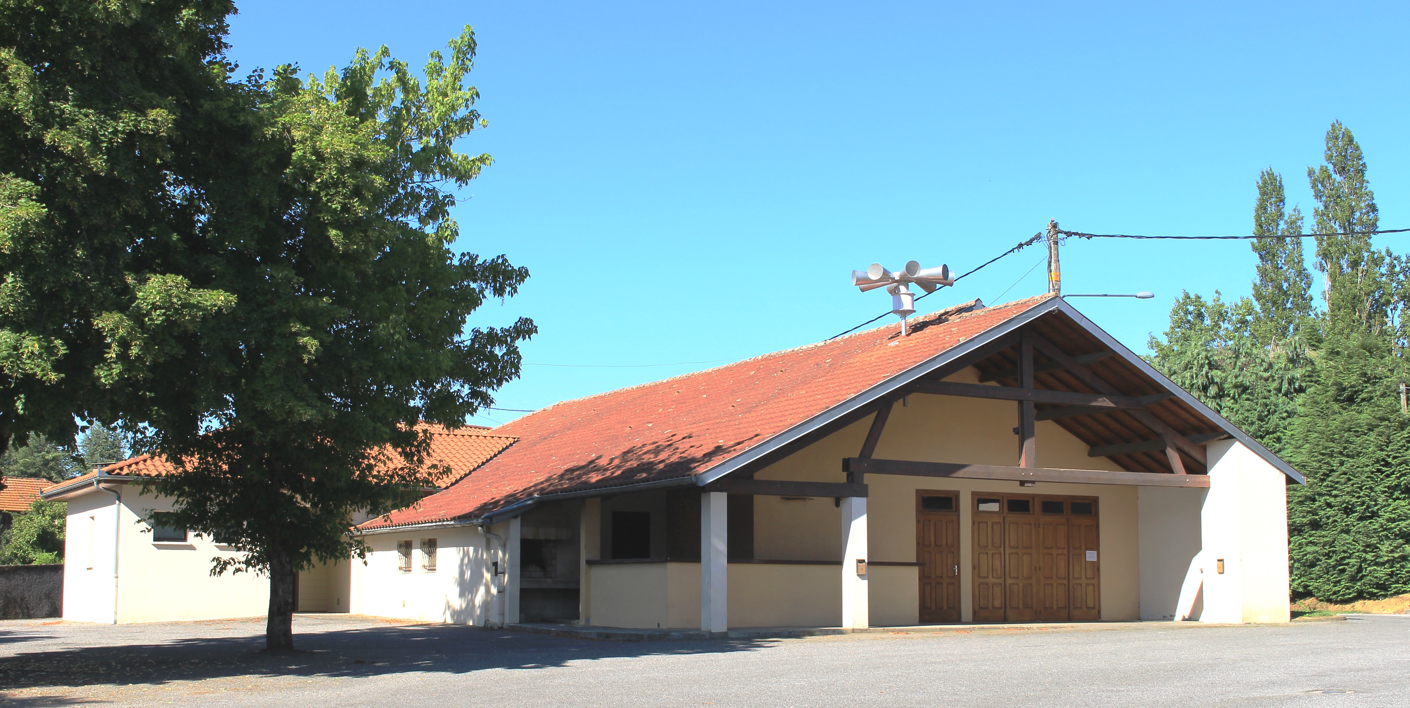 Salle des fêtes de Campistrous (Hautes-Pyrénées)